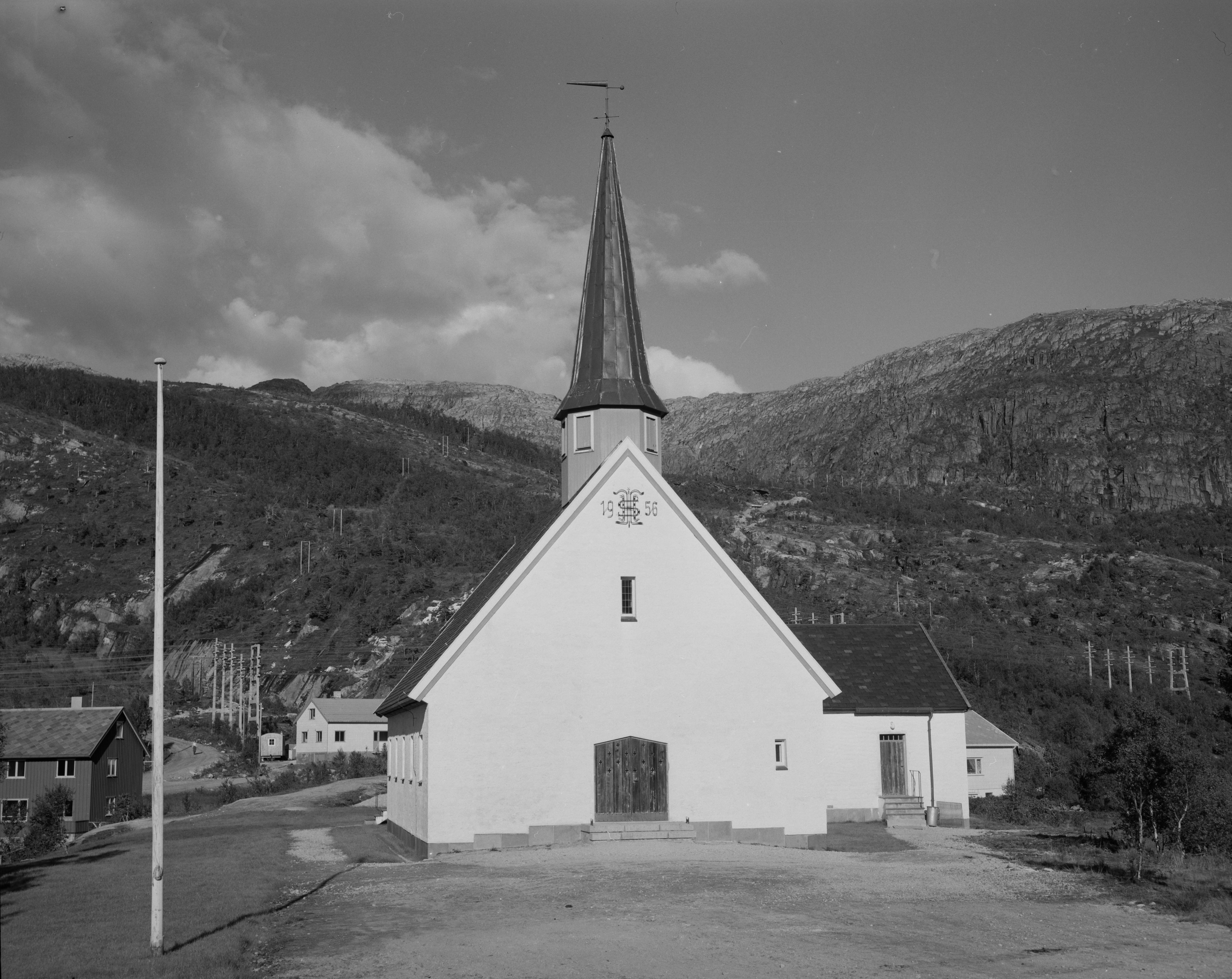 Bildet er hentet fra Nasjonalbibliotekets bildesamling. Anmerkninger til bildet var: Fotograf: LS Glomfjord, Meløy, Nordland